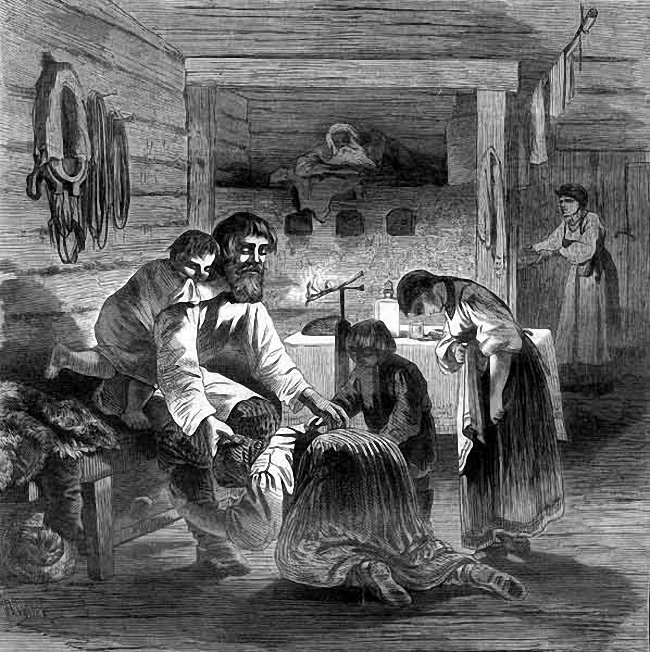 К. Крыжановский Масленица. Прощеный день в крестьянской семье (гравюра по рисунку Н.И. Соколова)